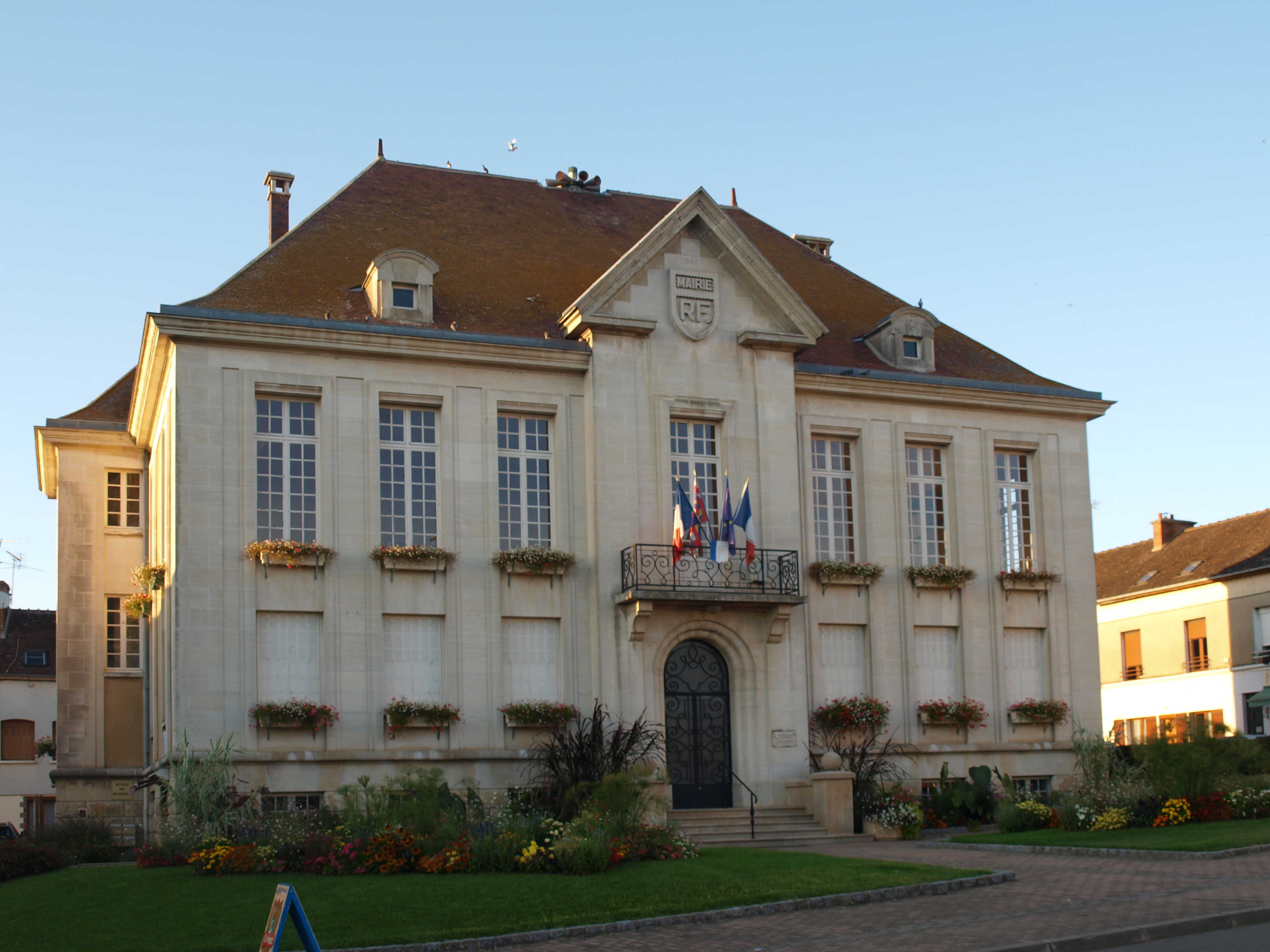 Aillant-sur-Tholon (Yonne, France) ; la mairie.